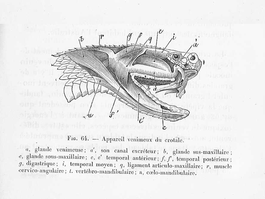 Crotale - appareil venimeux dessiné & commenté